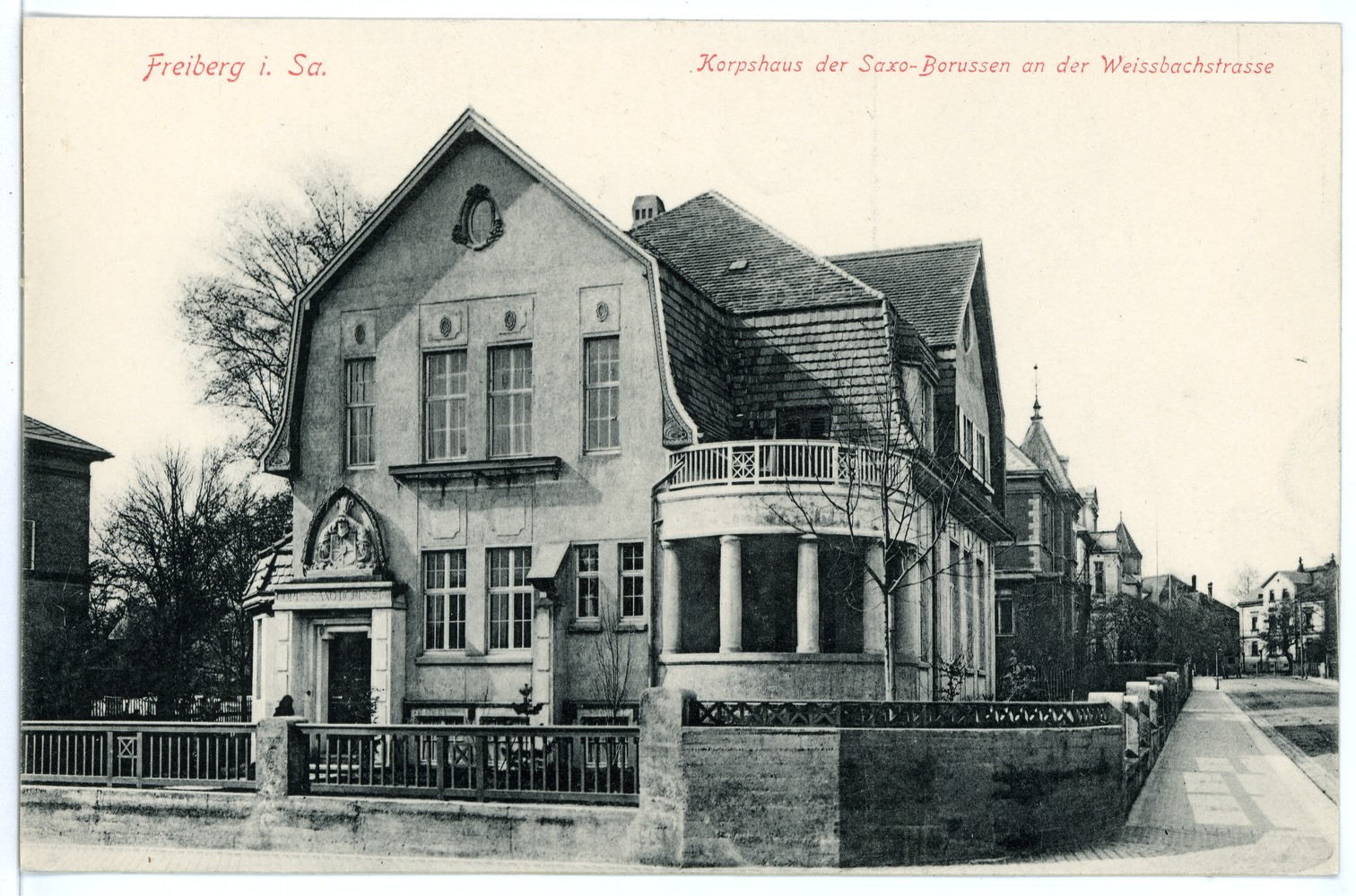 Freiberg; Corpshaus der Saxa Borussen This postcard is from publisher Brück & Sohn in Meißen ( postcard has a unique number 15629 and is available in a higher resolution at the publisher. This images was uploaded in a cooperation project between Wikipedians and the publisher.